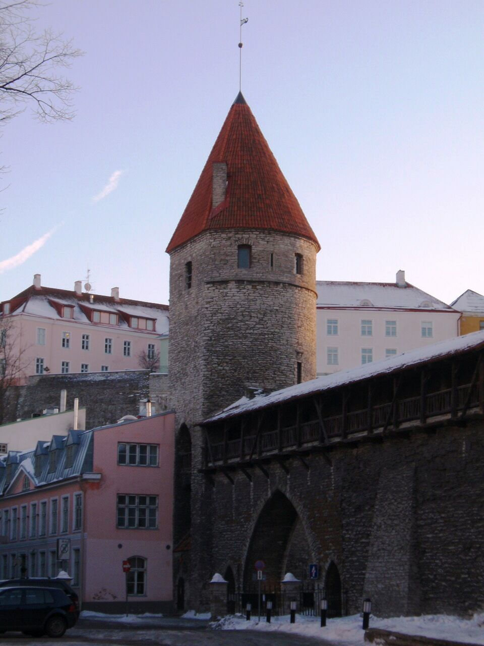 Nunnatorn Tallinna linnamüüris.